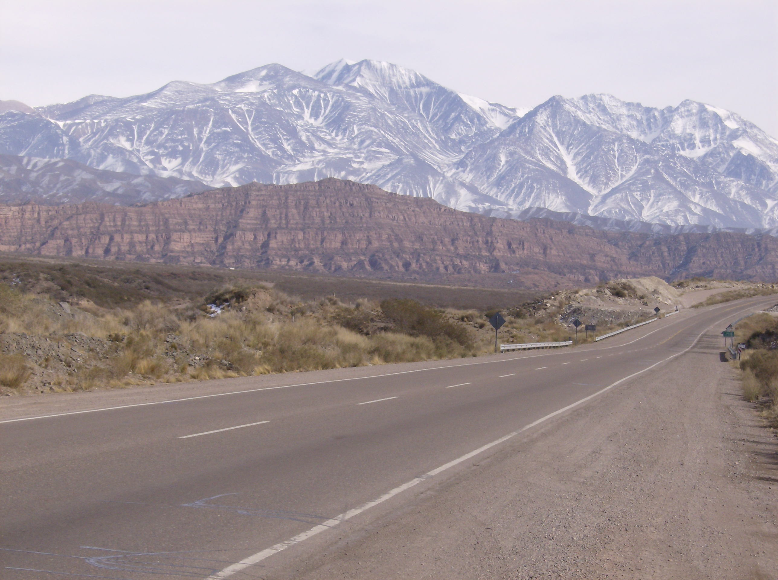 A highway (Ruta Nacional 7) in Mendoza, Argentina, near Uspallata.